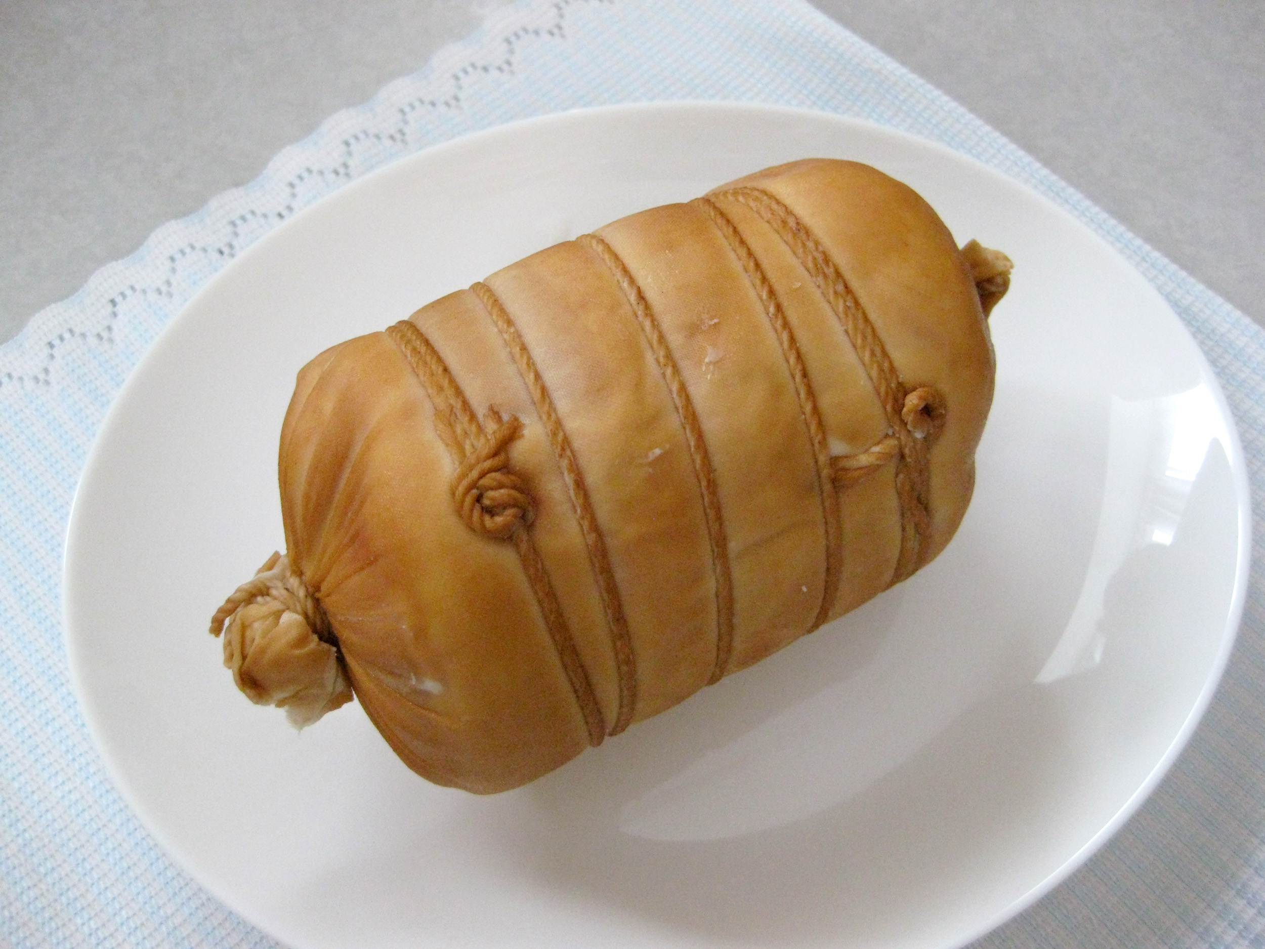 Pork loin ham, 鎌倉ハム冨岡商会 (Kamakuraham-Tomioka), see 鎌倉ハム.